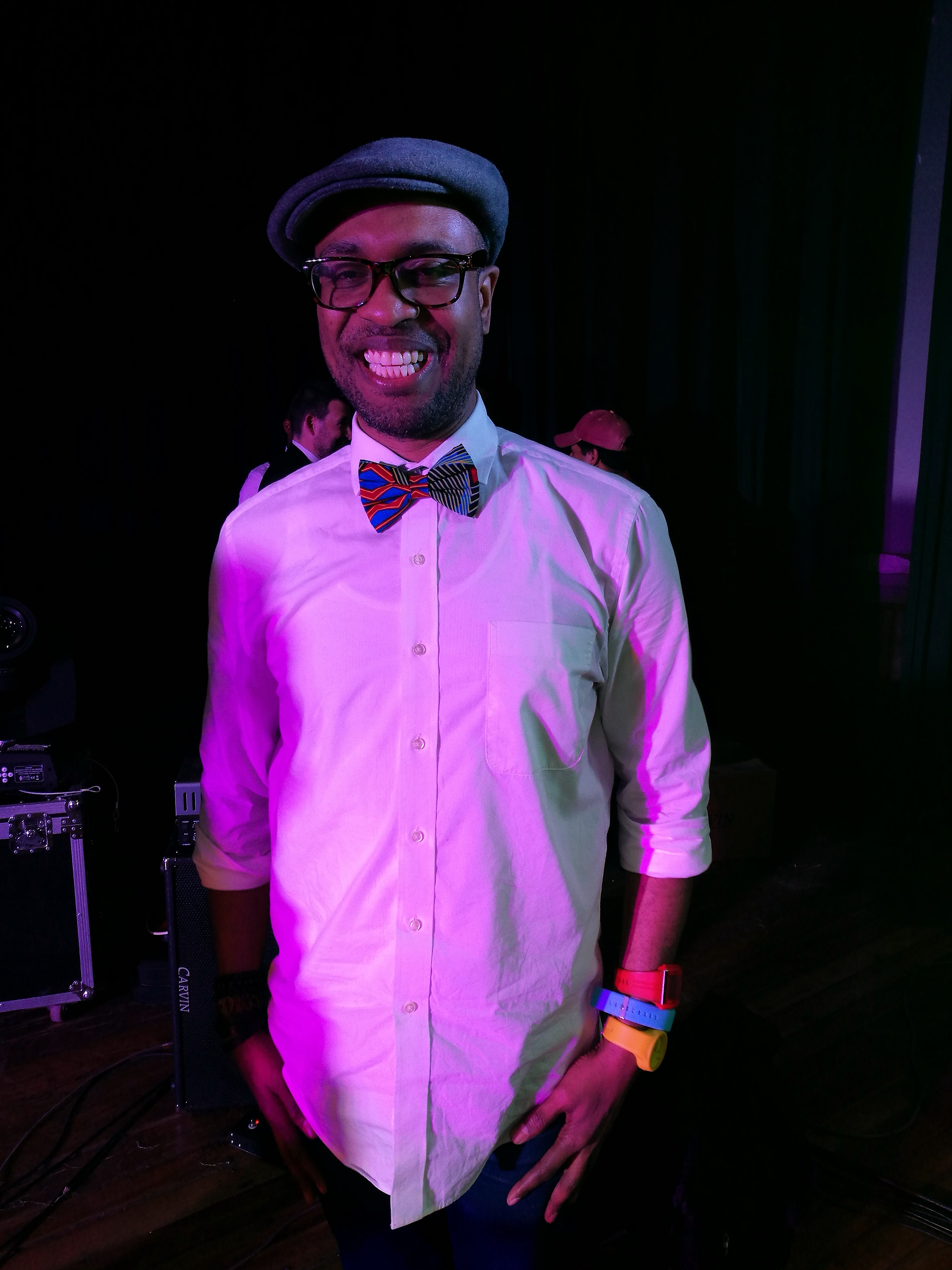 Kenny Wesley en concert a Cajamarca el gener de 2017